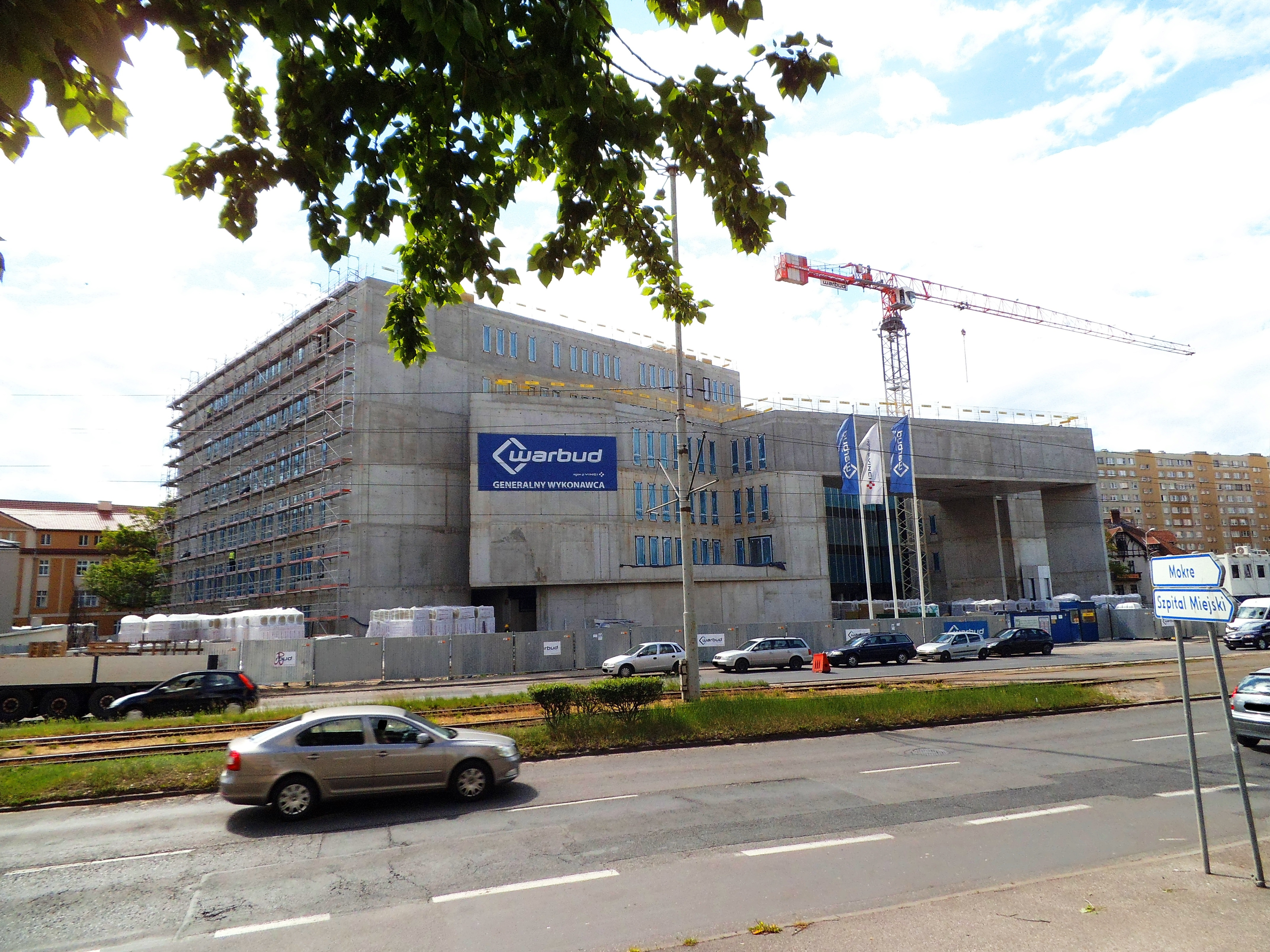 Budowa Sądu Rejonowego w Toruniu, 2020